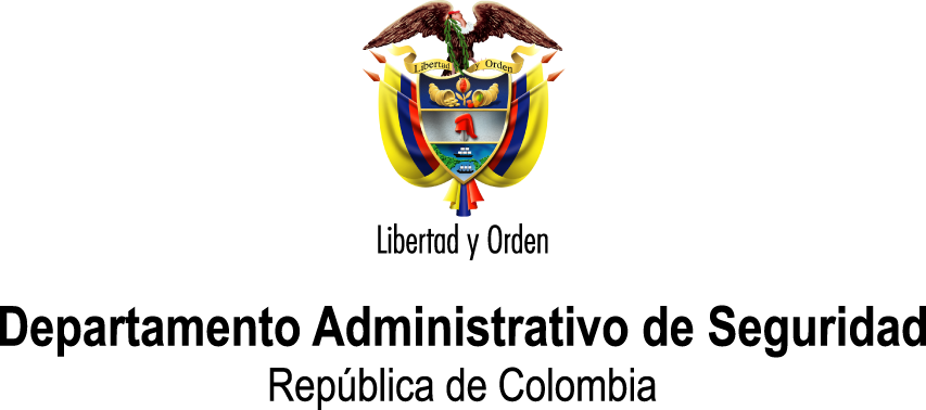 Logo Oficial Departamento Administrativo de Seguridad - Colombia